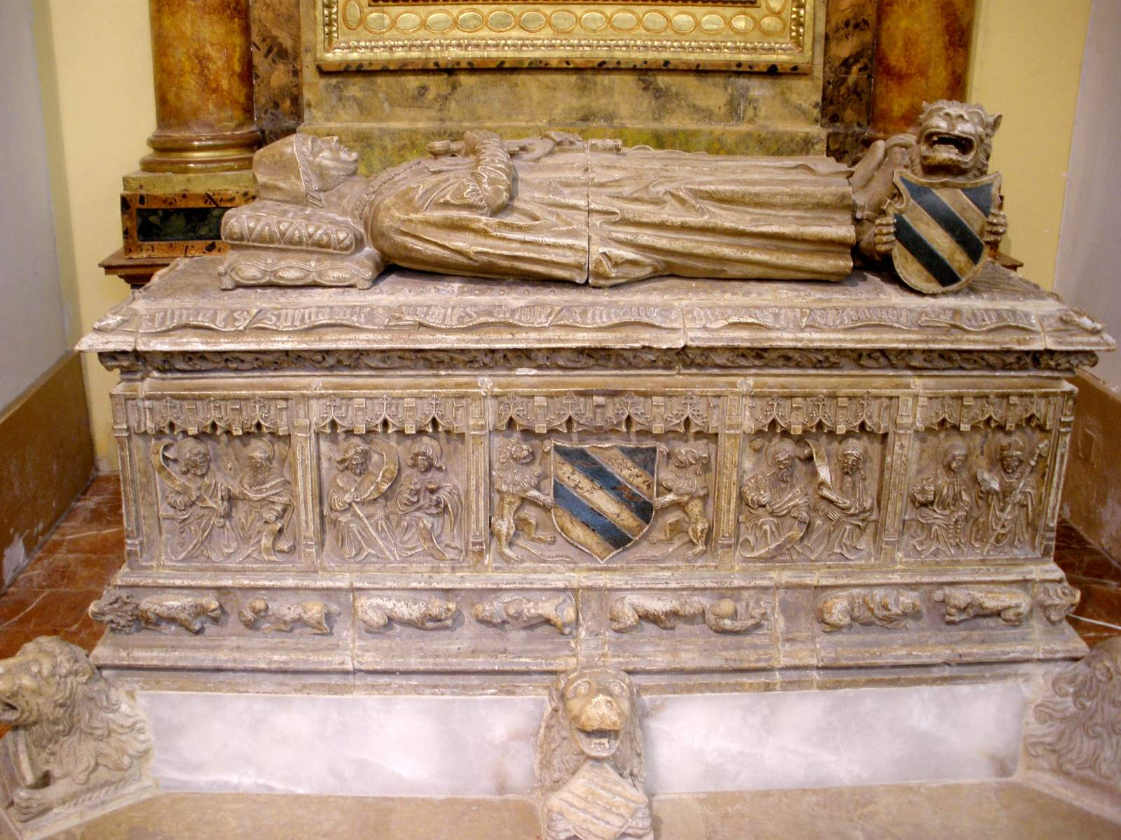 Interior of the Church of Santa María la Mayor, Épila. Tomb of Don Lope Ximénez de Urrea